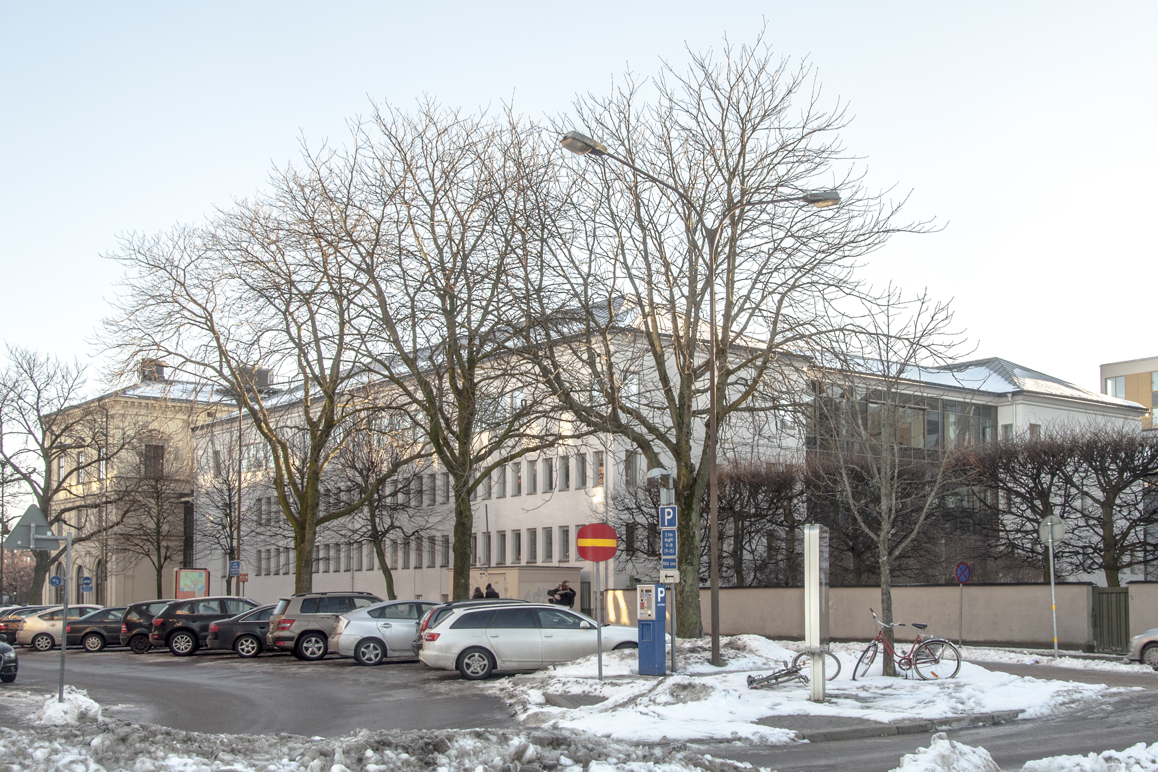 Värmlands tingsrätt sedd från Kungsgatan, tillbyggnader 1975-1976. Arktiekt Olle Dahlén